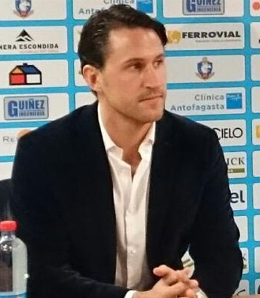 Beñat San José técnico español de Deportes Antofagasta.